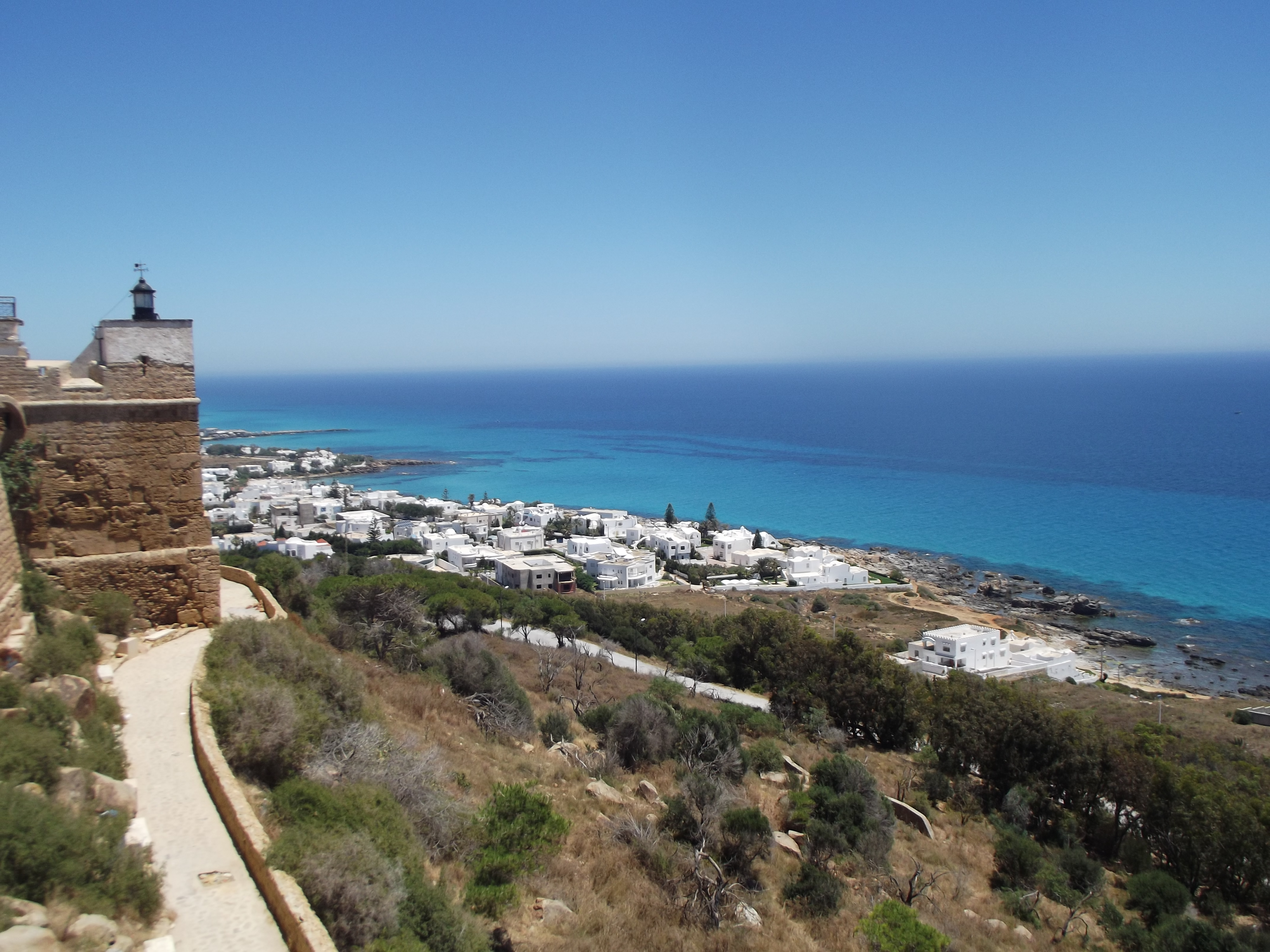 Ancien fort appelé « Kasba », Kélibia, vue sur la ville et la mer